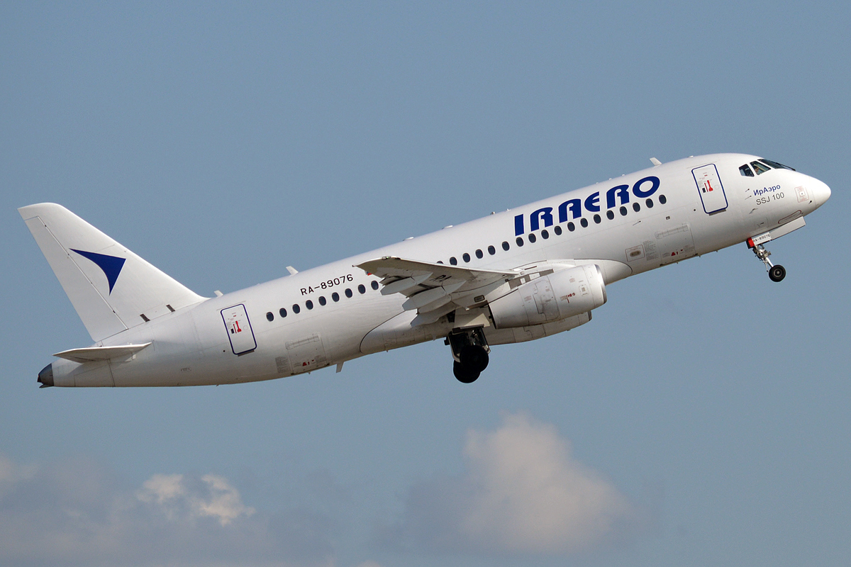 IrAero, RA-89076, Sukhoi Superjet 100-95LR